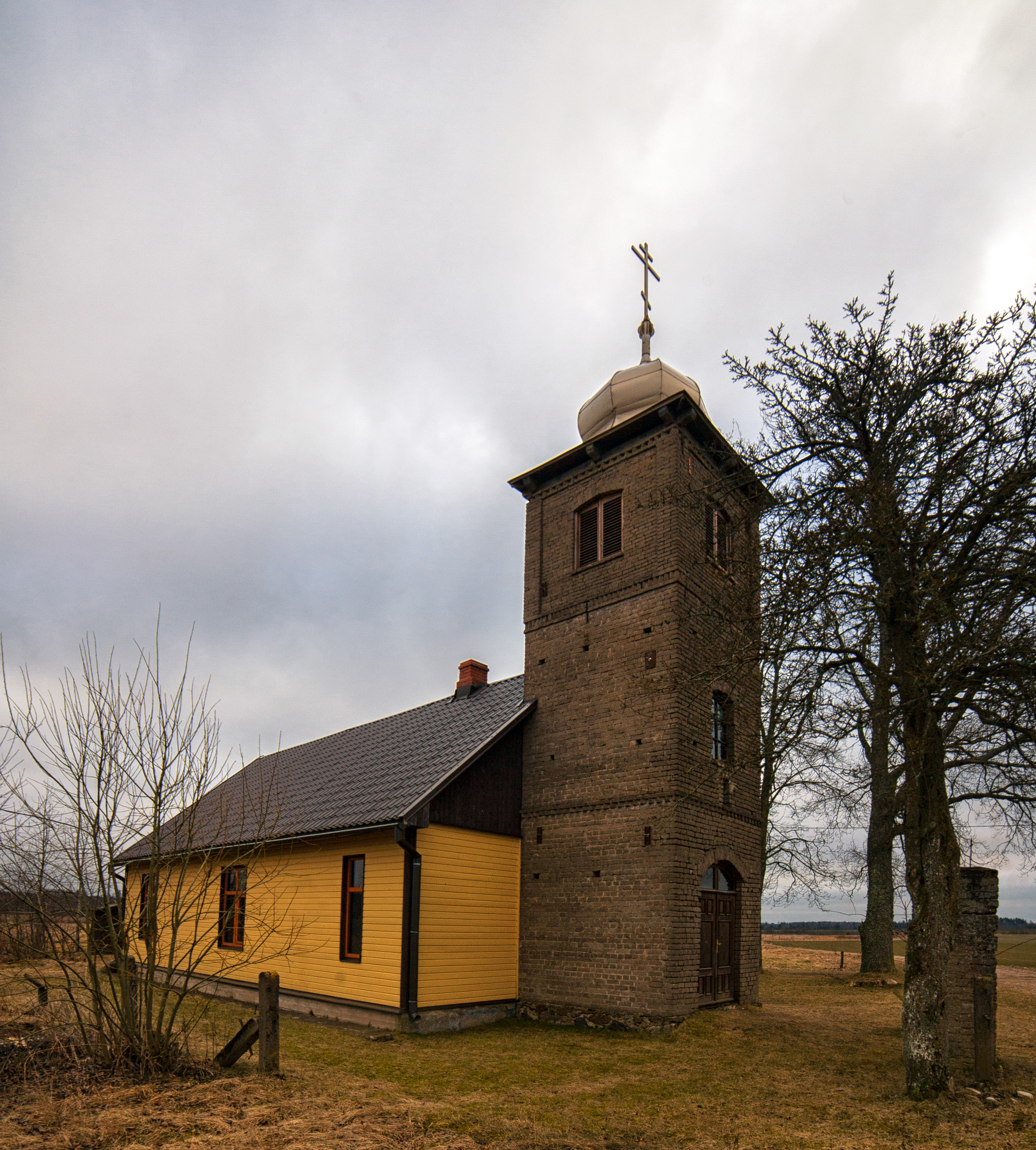 Virbu (Neivakenas) vecticībnieku baznīca